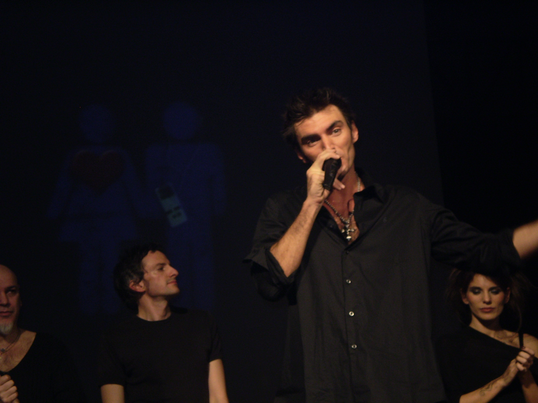 Opera propria